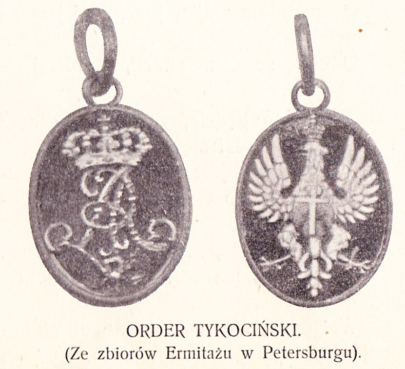 Nieznane oznaki orderowe polskie. Order Tykociński - Oznaka z czasów Sobieskiego - Order konf. Barskiej.